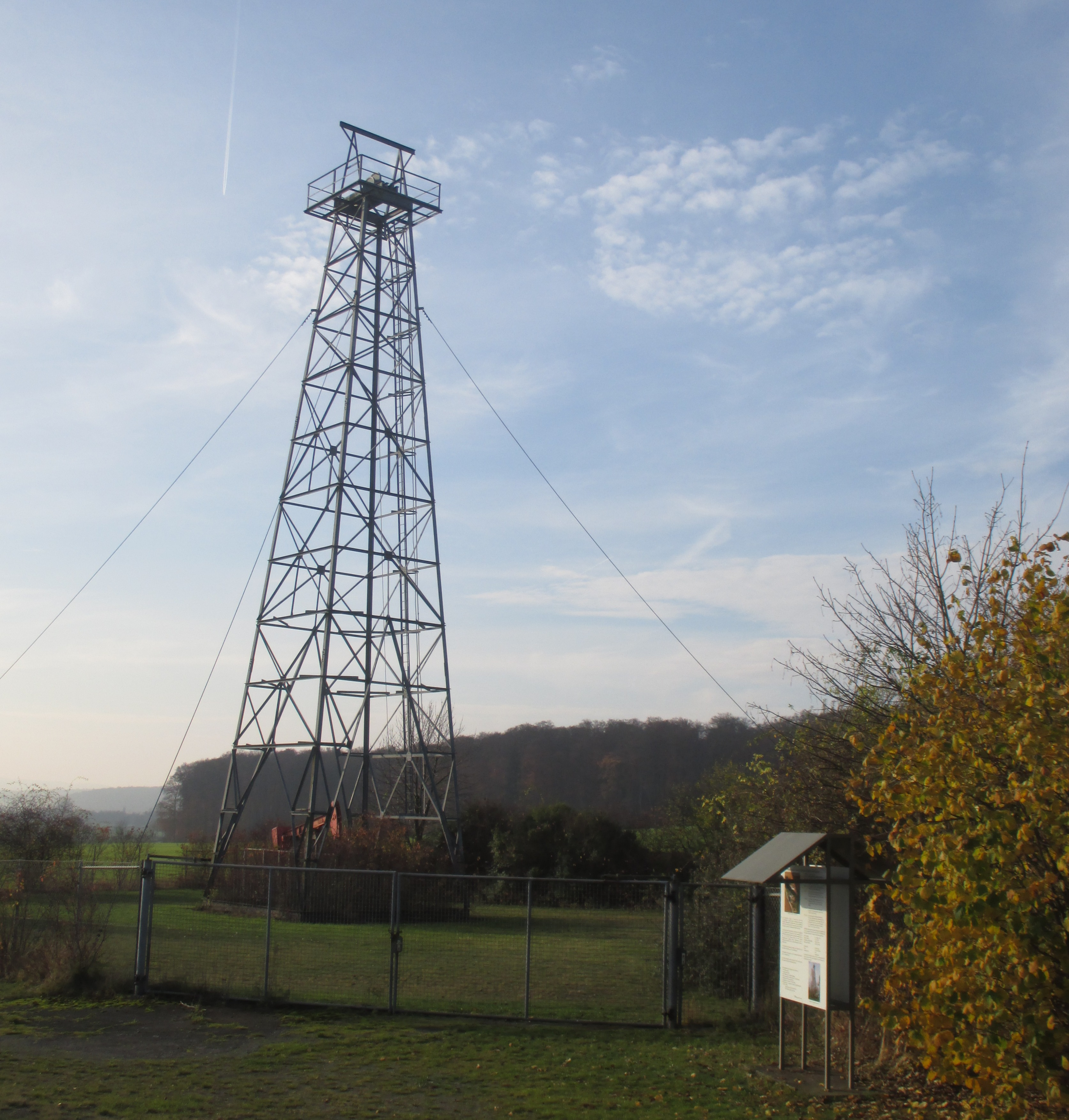 Industriedenkmal zur Erdölförderung bei Hohenassel, Gemeinde Burgdorf, Landkreis Wolfenbüttel